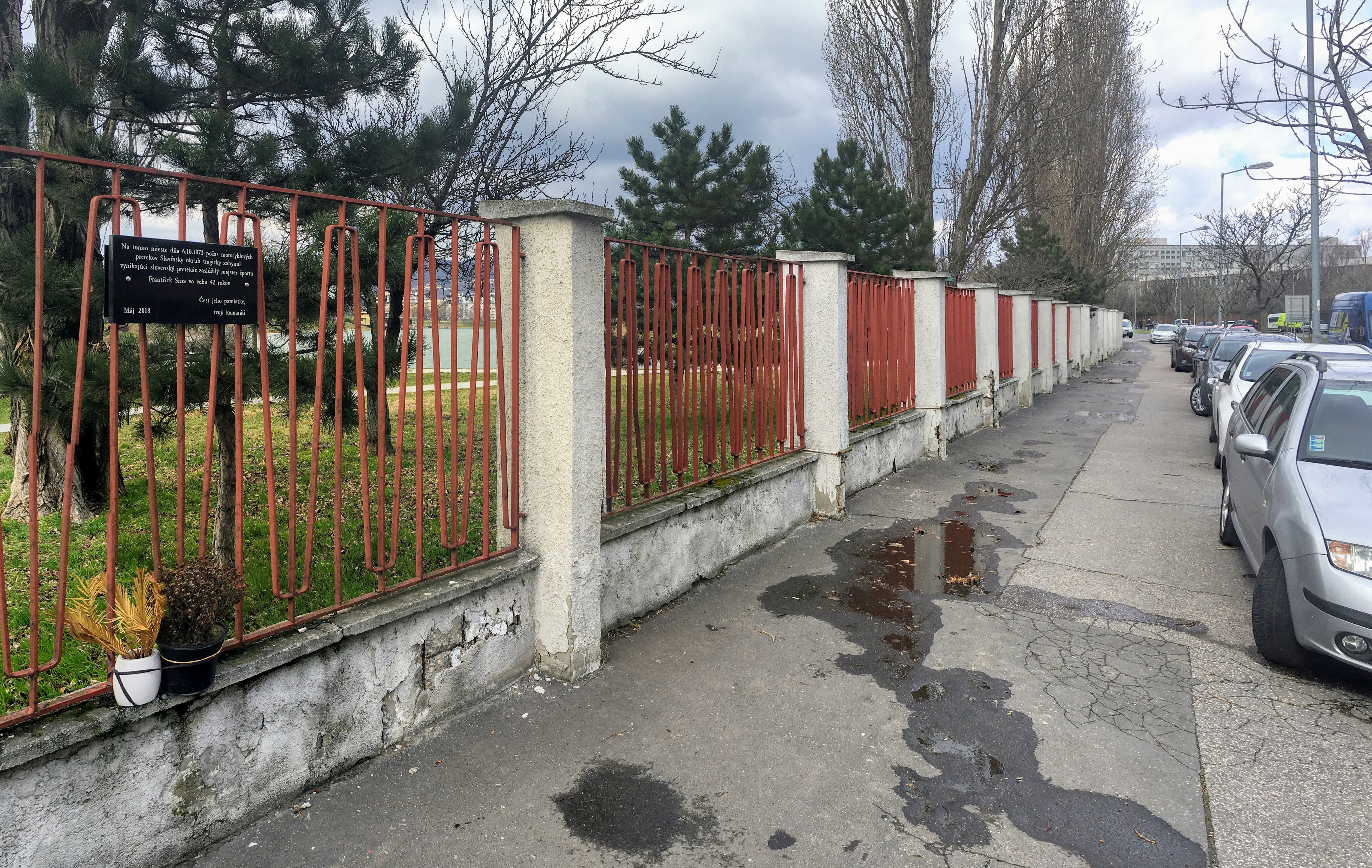 František Srna - pamätná doska na mieste tragickej nehody (jazero Kuchajda, Bratislava)